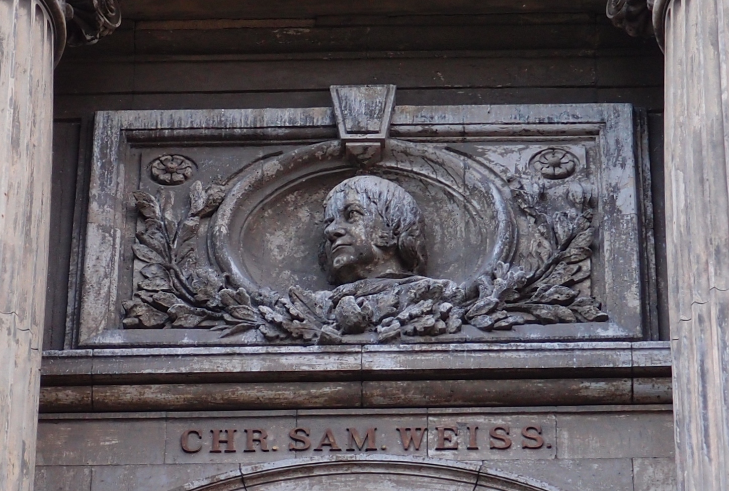 Christian Samuel Weiss (1780-1856), Mineraloge und Kristallograph; Relief über dem Eingang des Naturkundemuseums in Berlin-Mitte